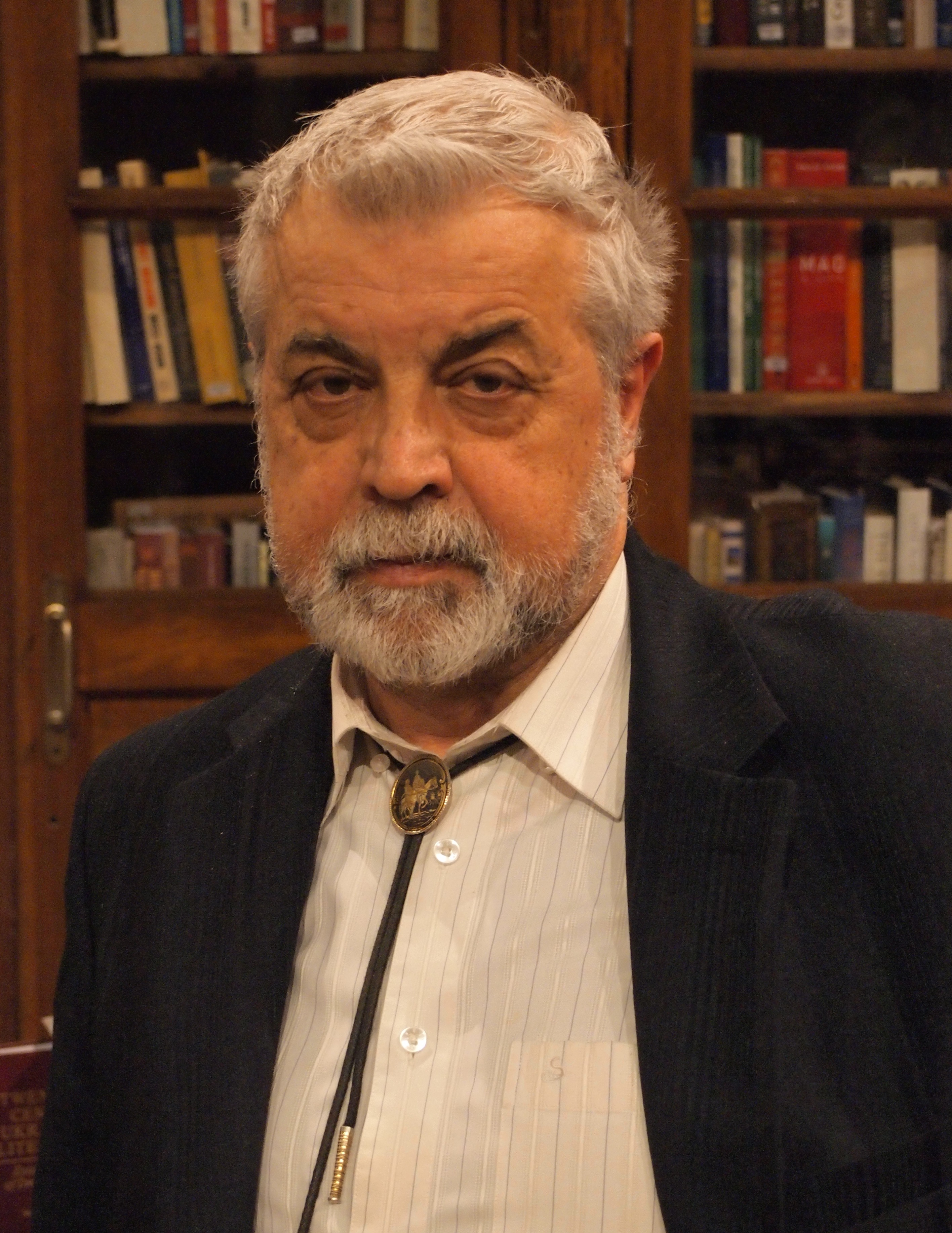 Лесь Танюк.jpg: Лесь Танюк, на презентації другого тому книги «Наш Лука́ш» в Києво-Могилянській академії